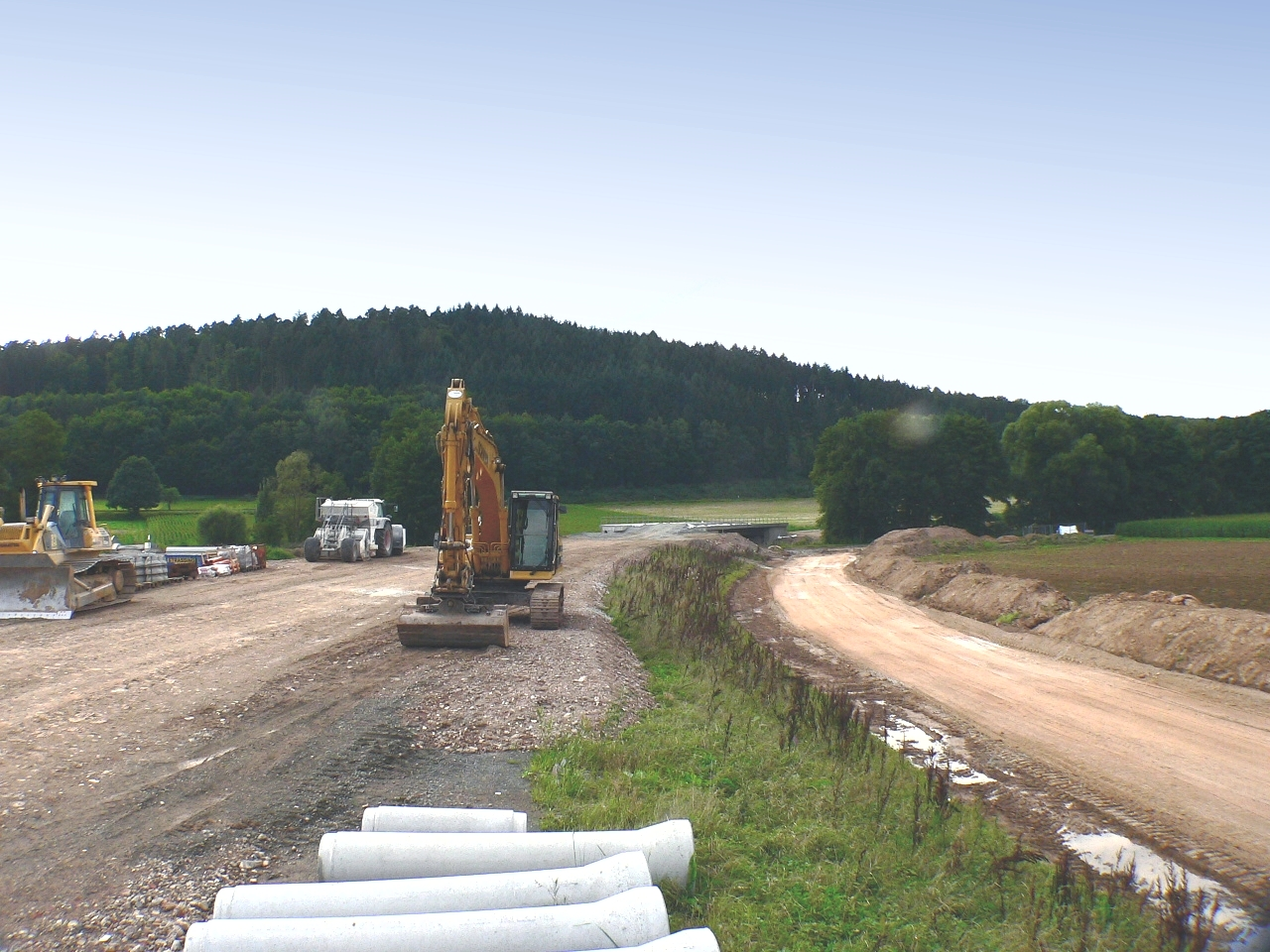 B 45 Westumgehung von Höchst im Odenwald in Bau - im Hintergrund: Neue Brücke über die Mümling